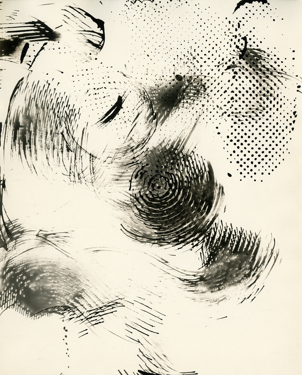 Serie fotografica : Italia, 1970 / Paolo Monti. - Stampe: 3 : Chimigramma, gelatina bromuro d'argento/ carta, 24x30. - ((Al verso di una stampa iscrizione inventariale manoscritta a matita: "CH/SLA 24". - Sul coperchio della scatola iscrizione didascalica manoscritta a pennarello nero: "3CH".